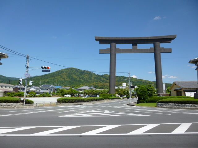 Basa Jawa: 三輪山と大鳥居